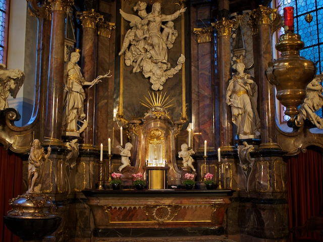 Hochaltar von St.Marien. Aufnahme vom Dezember 2011 mit neuer Beleuchtung.